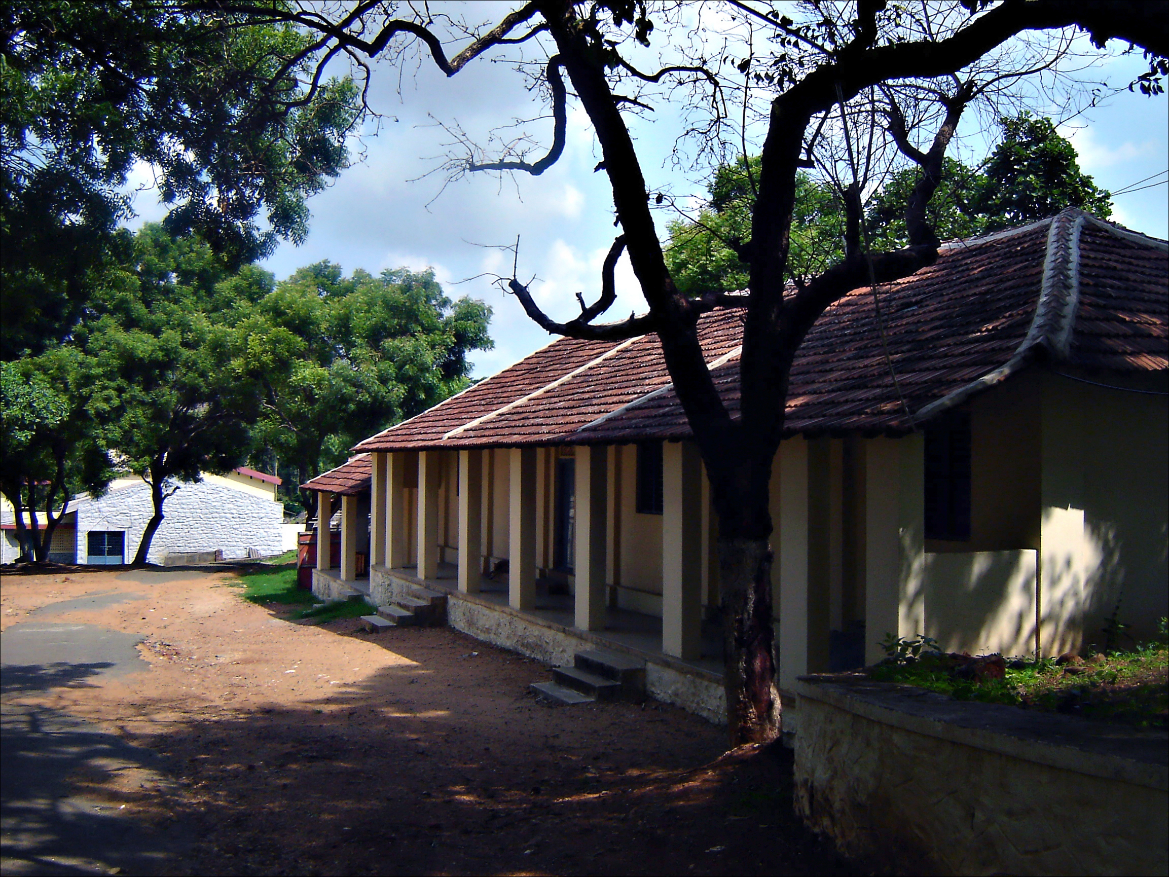 Chinmaya Vidyalaya, Pallavur, Palakkad, Kerala, India